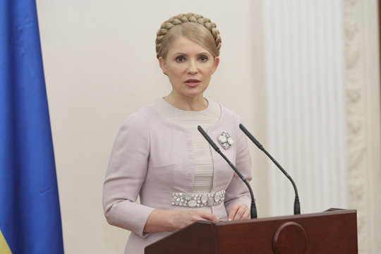 По итогам российско-украинских переговоров и заседания Комитета по вопросам экономического сотрудничества В.В.Путин и Ю.В.Тимошенко провели совместную пресс-конференцию